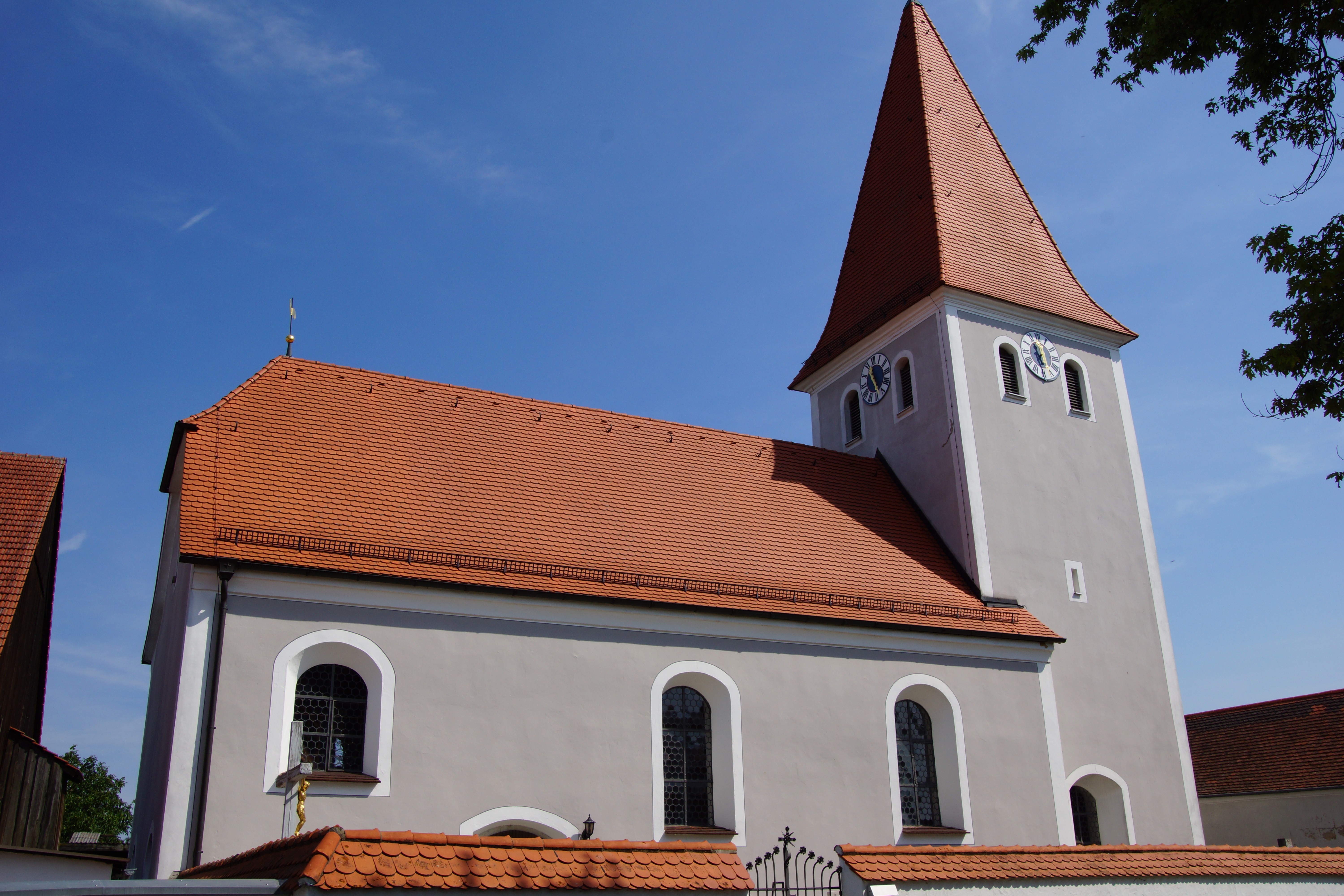 Die katholische Filialkirche St. Wolfgang im Juraort Litterzhofen, Stadt Eichstätt